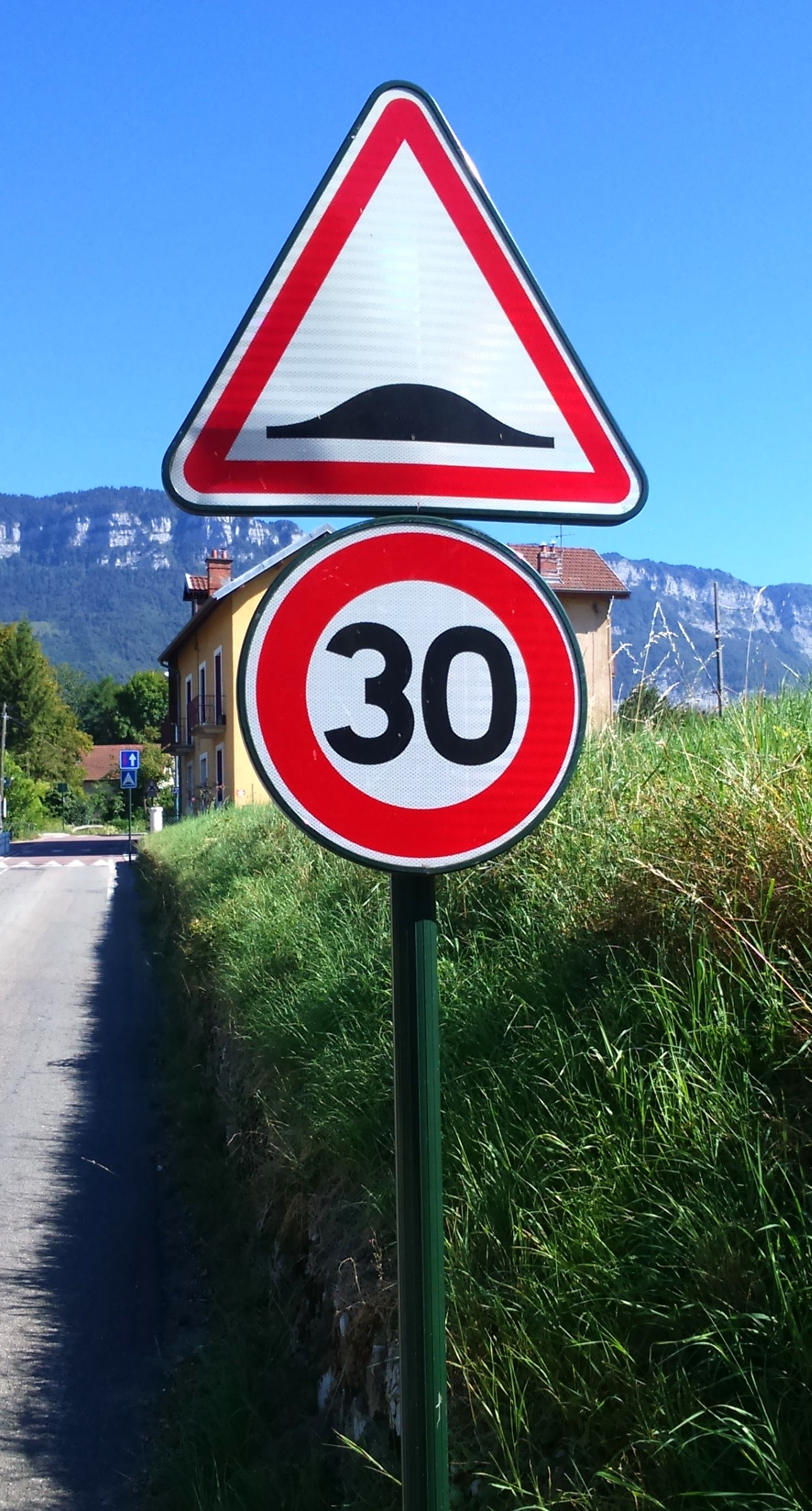 Deux panneaux de signalisation de type A2b (annonce de ralentisseur type dos-d'âne) et B14 (ici avec vitesse limitée à 30 km/h).